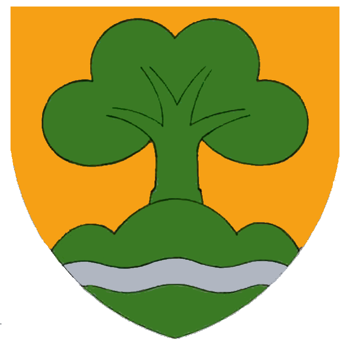 blazono de Bergland, ĝis nun manka en vikipedio